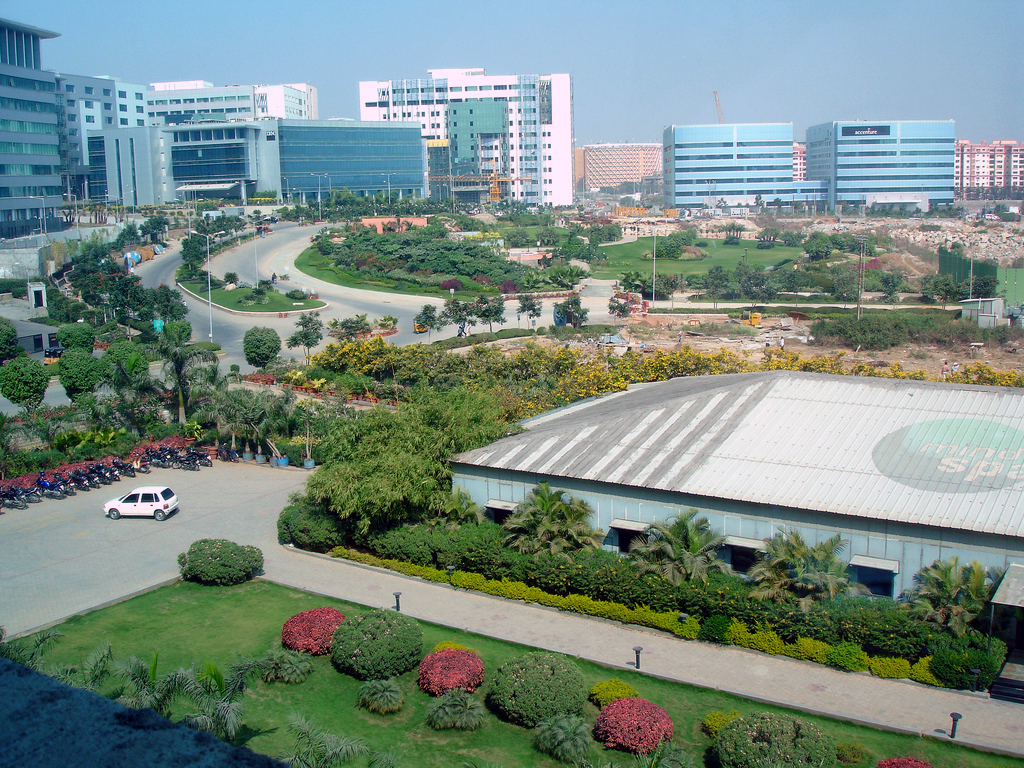 MindSpace campus, Hyderabad